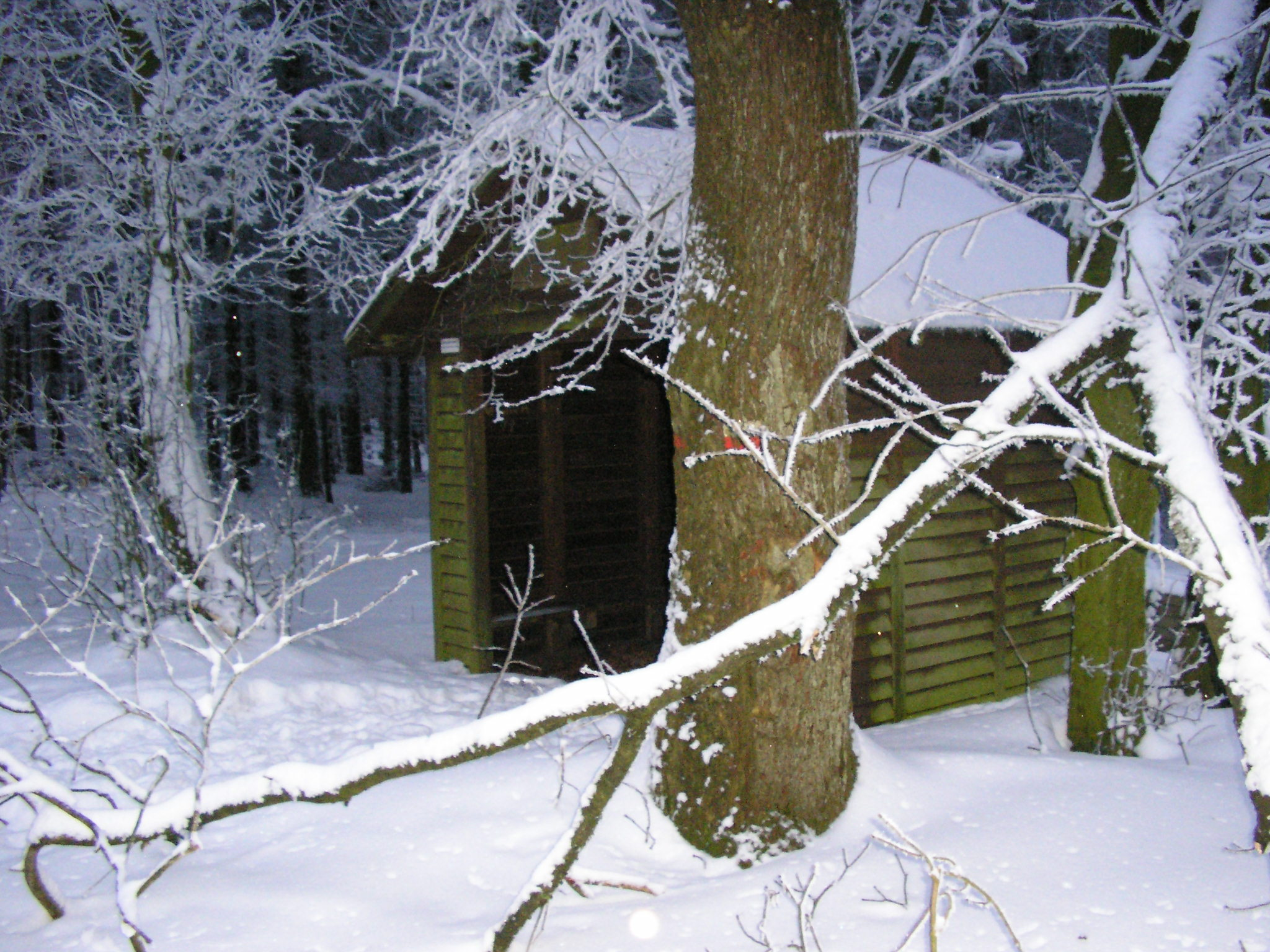 Heidbrinkhütte im Winter 2010